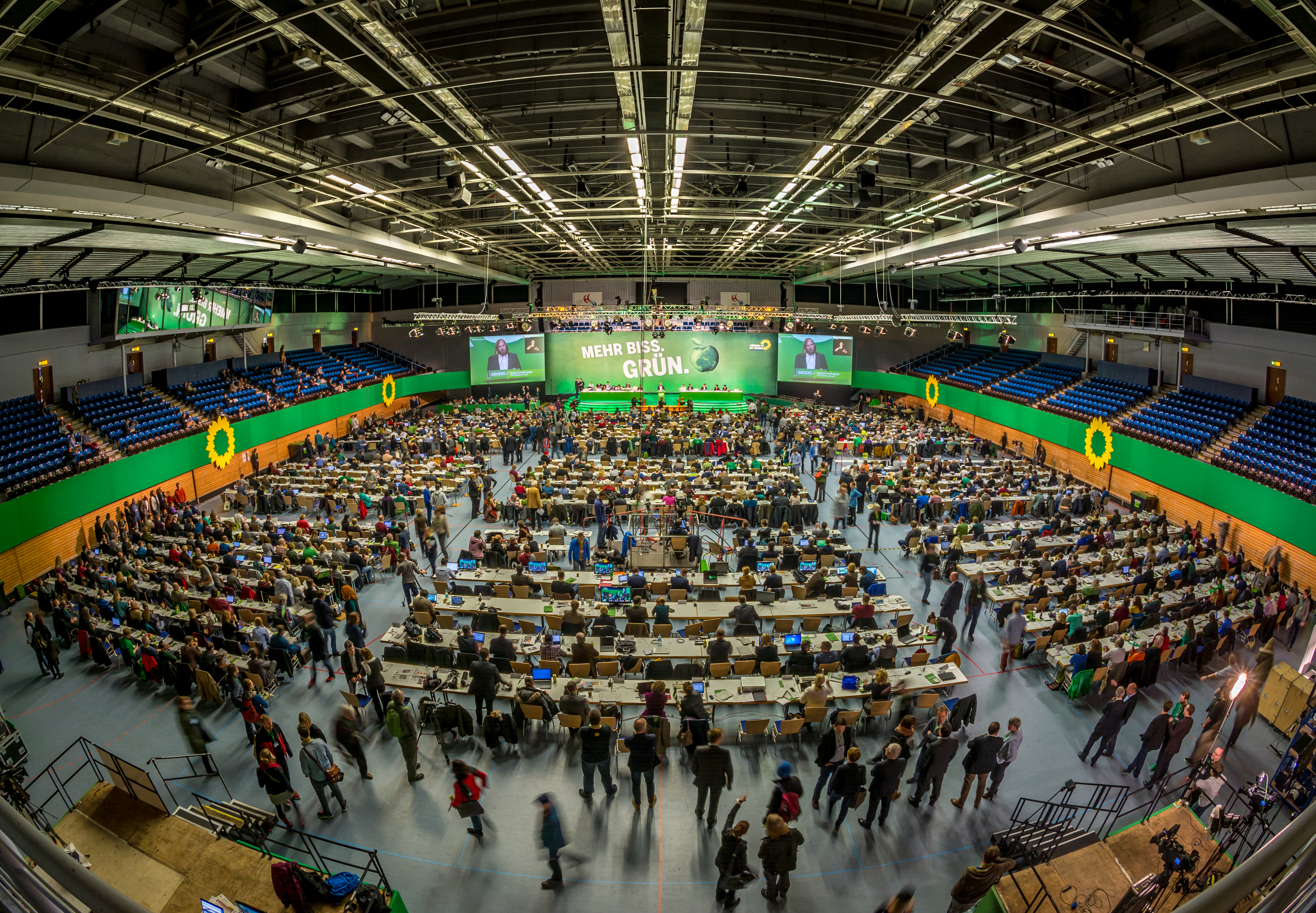 Die Halle beim Parteitag der Grünen am 22.11.2014 in Hamburg. Aufgenommen mit dem 10mm Fisheye von Sgima.